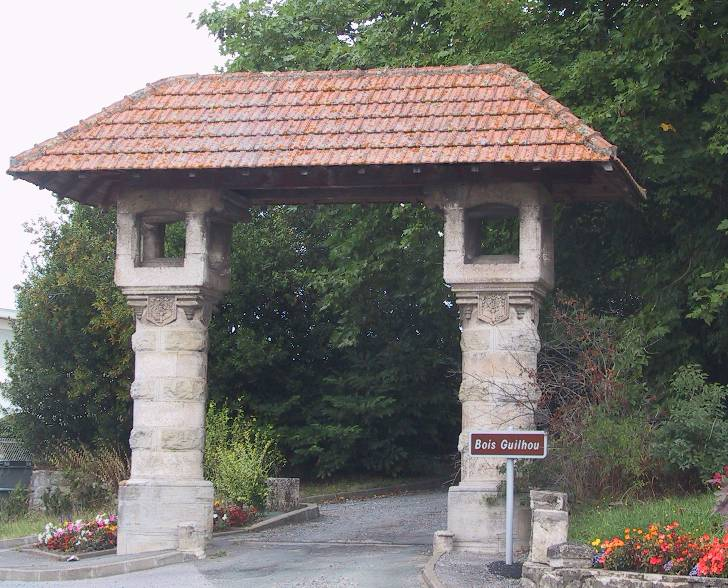 Description:Porche ouest du bois Guilhou Lieu:fr:Boucau - Pyrénées-Atlantiques (64) Date:Août 2005 Auteur: Licence:CC-BY-SA FR 2.0